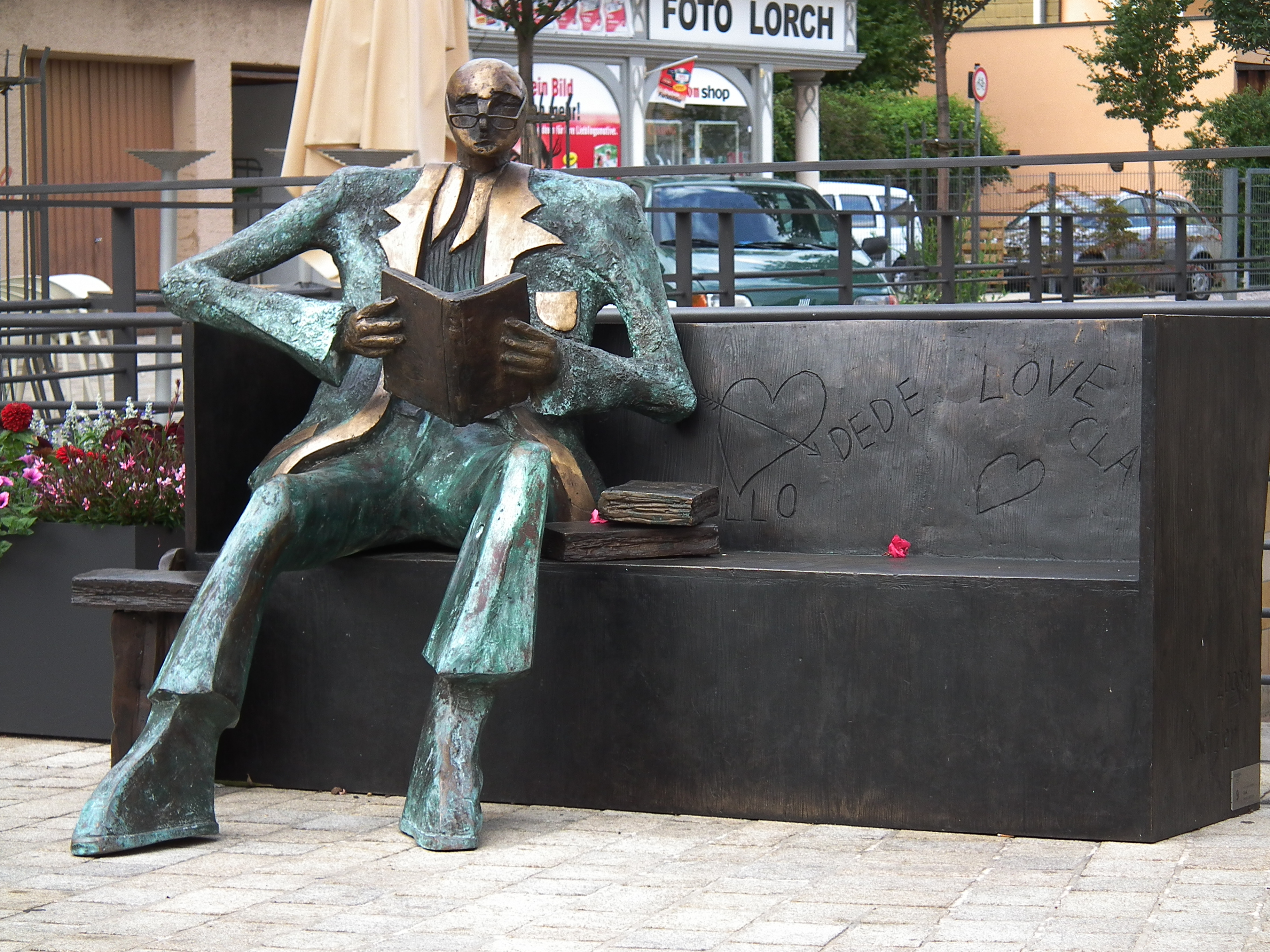 Bronze-Skulptur "Bank" (2000/2001) von Kurt Laurenz Metzler, fotografiert in Landau (Rheinland-Pfalz, Deutschland)